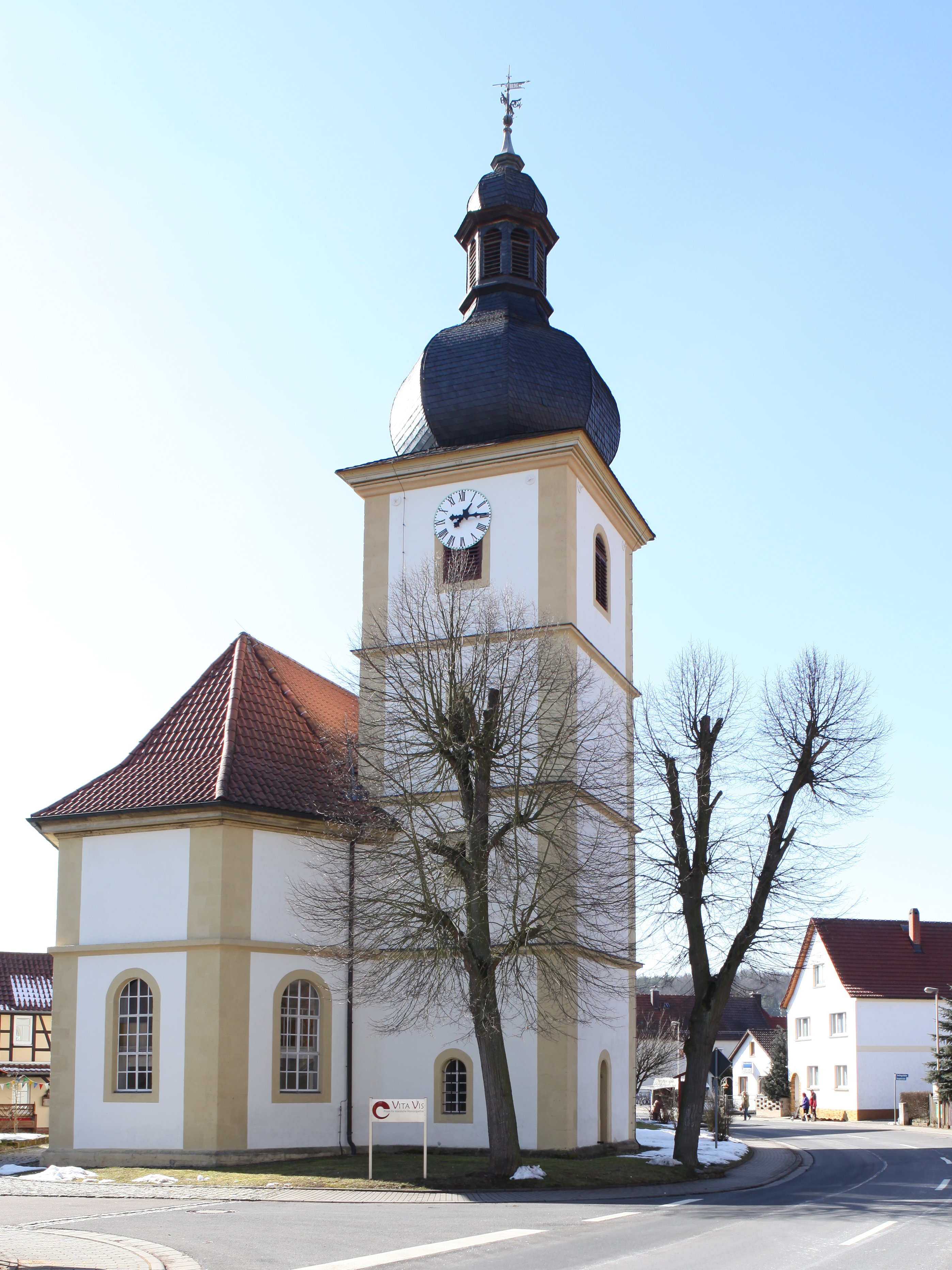 Chor und Turm der Ev. Kirche in Seidingstadt, OT von Straufhain, Landkreis Hildburghausen